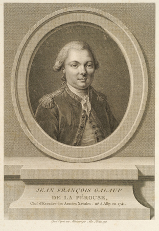 Gravure de Jean-François Galaup, comte de La Pérouse (1741-1788)